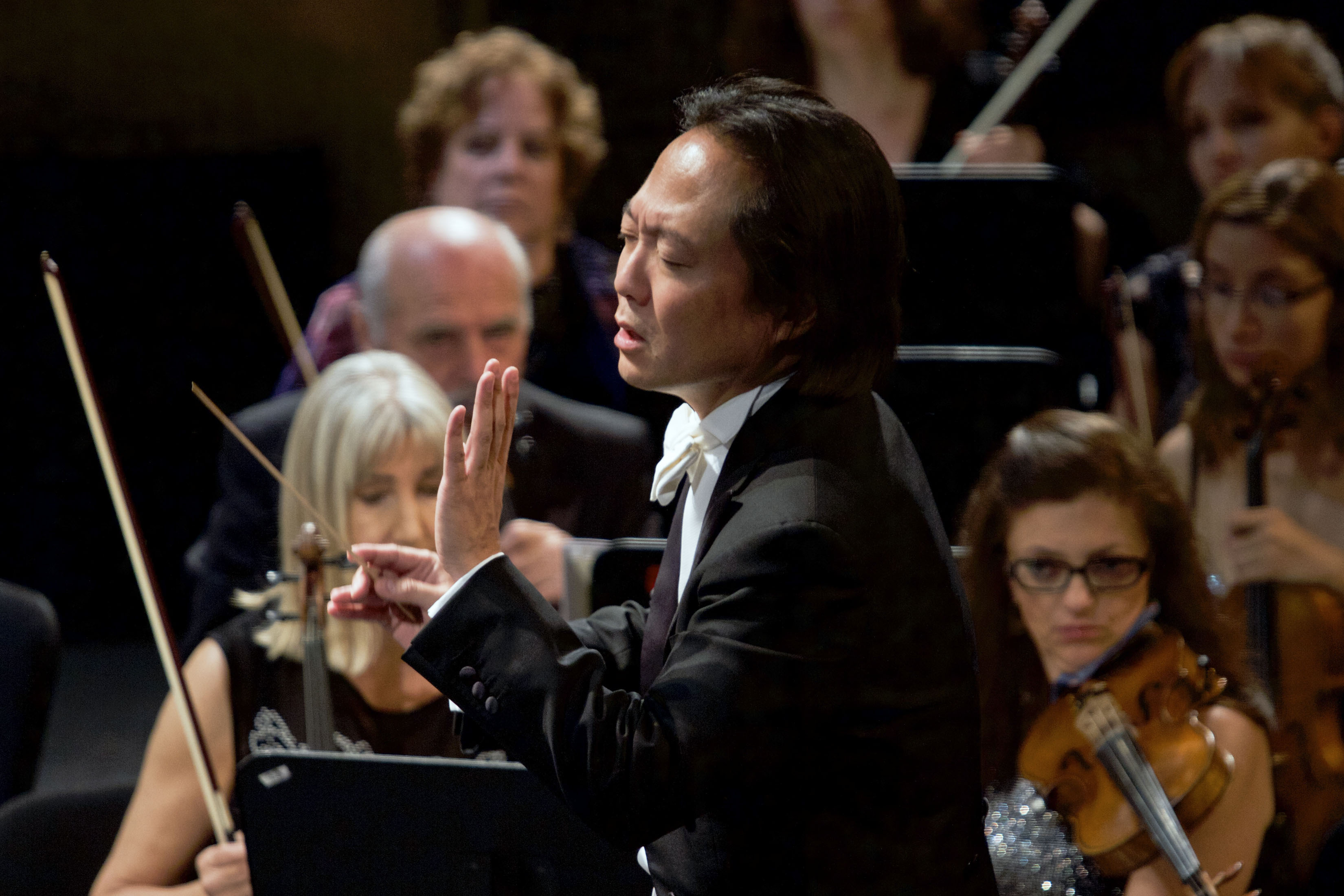 Miércoles 28 de septiembre de 2016. En el Teatro de la Ciudad Esperanza Iris, la Orquesta Filarmónica de la Ciudad de México, festejó su aniversario 38, con un concierto de la batuta de Scott Yoo, su director artístico y director principal. La primara parte del concierto la OFCM compartió escenario con el Cuarteto Latinoamericano, agrupación mexicana de alta calidad musical. Fotografía: Milton Martínez / Secretaría de Cultura CDMX